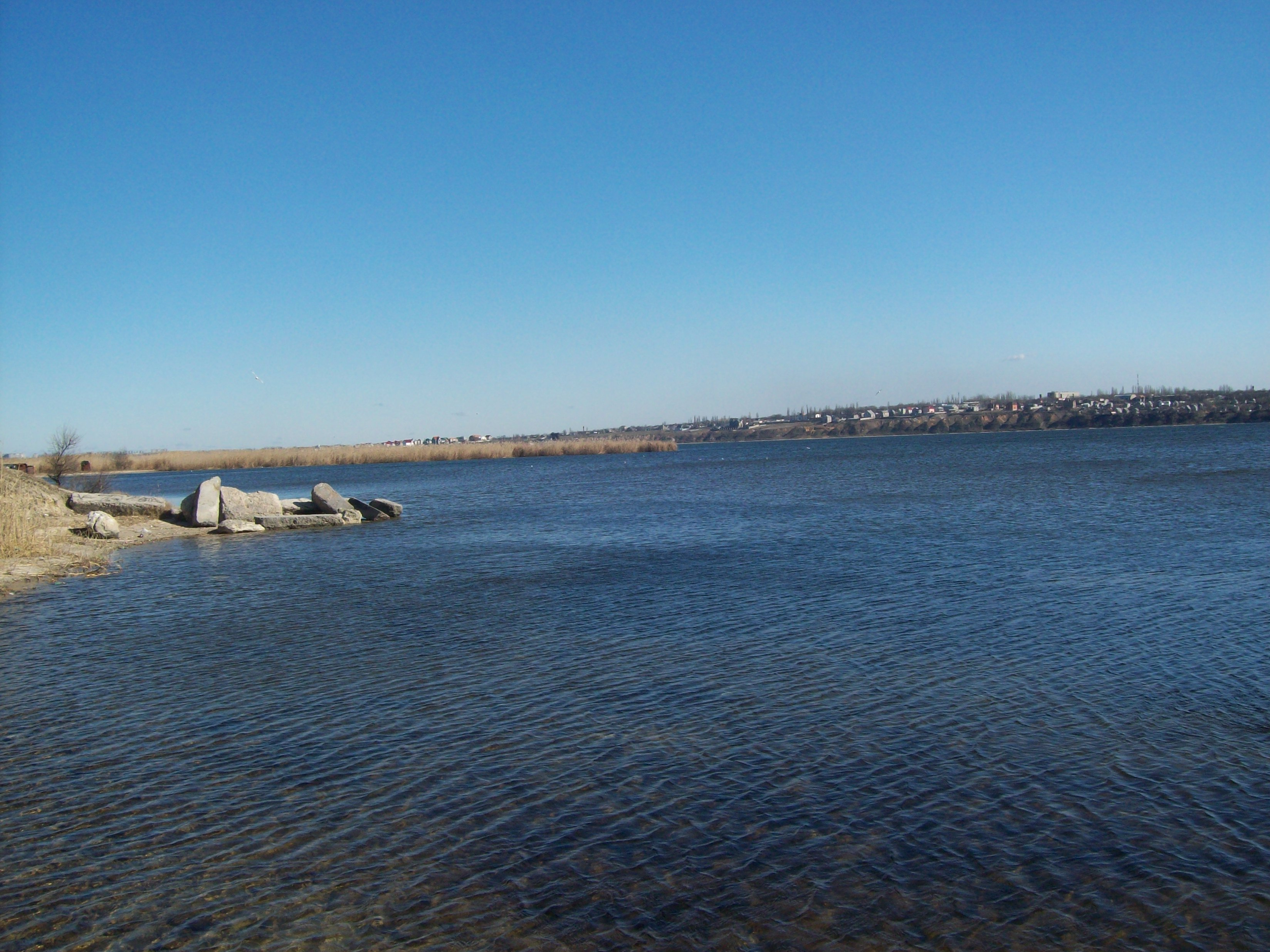 Взимку та навесні, у Бугу дуже чиста вода. З цього місця під час Другої світової війни, ходив німецький пором на Варварівку, який перевозив техніку та німецькі війська